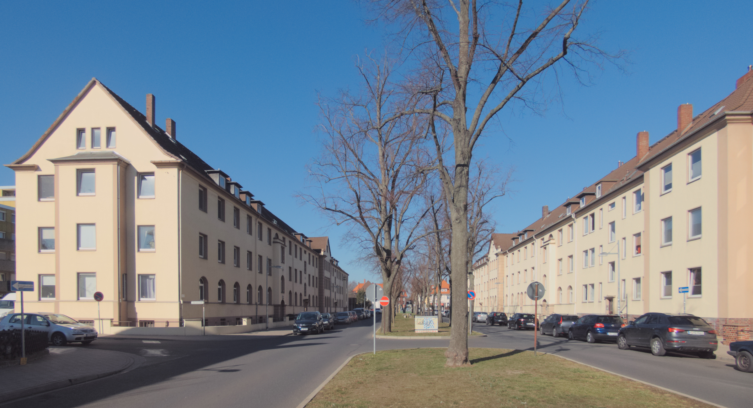 Das Gebäudeensemble Ebertstraße 10-20 ist ein Baudenkmal im Seelzer Stadtteil Letter.